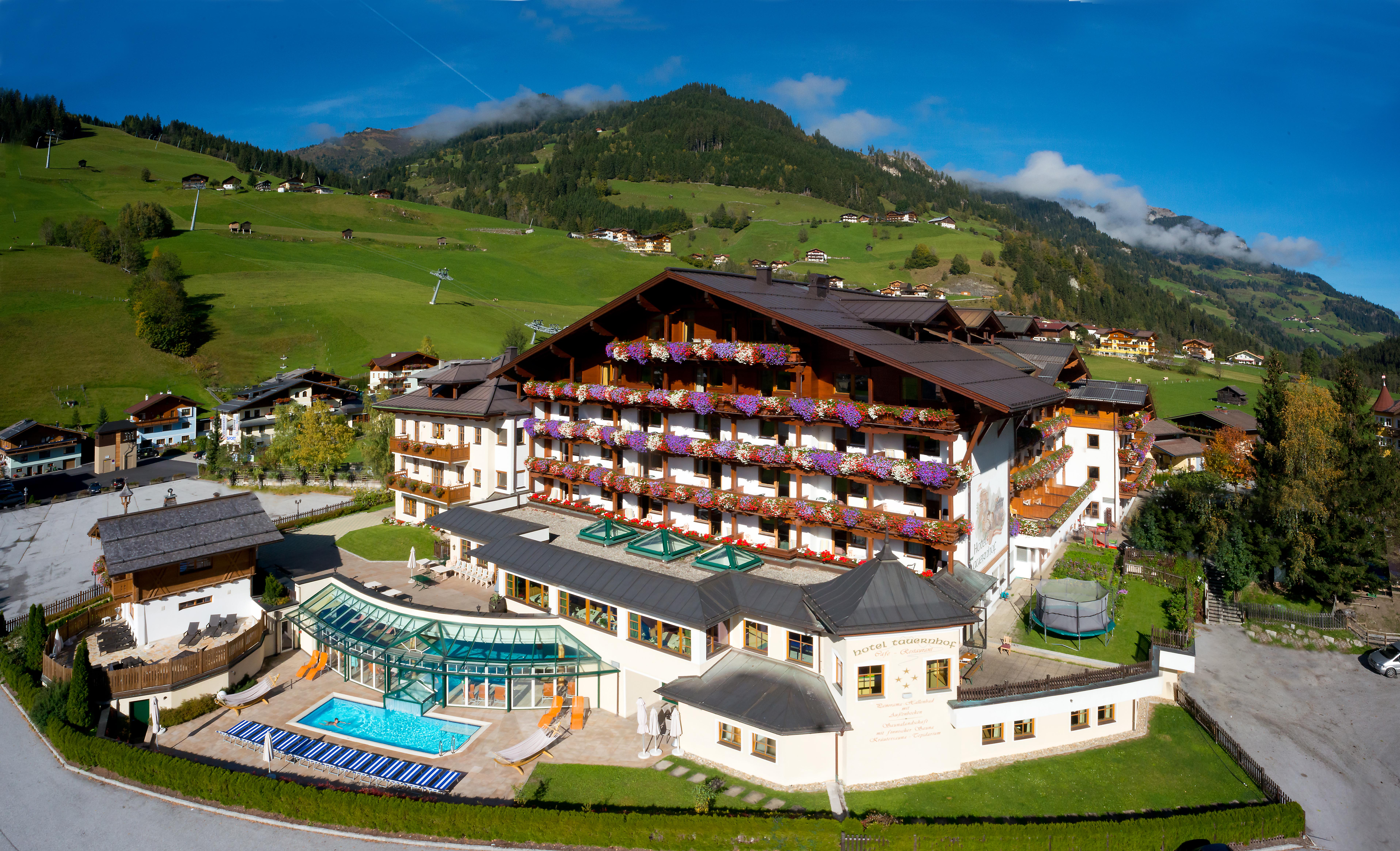 Eine Flugaufnahme vom Vitalhotel Tauernhof. Schön zusehen ist auch das beheizte Aussenschwimmbad. Das Vitalhotel Tauernhof gehört zu einem der renommiertesten Wellnesshotels im Salzburger Land.